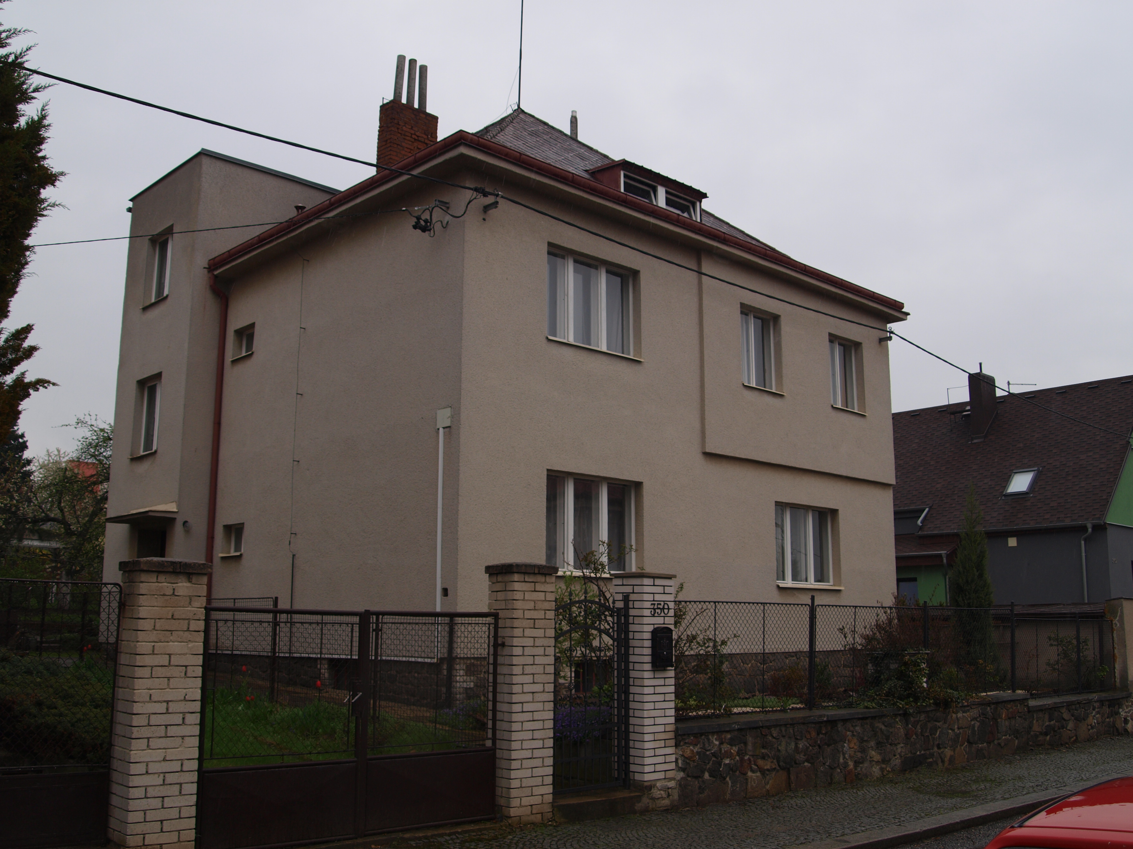 Česky: Dům, který Alois Laub obýval s rodinou v letech 1939 až 1943 v Příbrami a ve kterém byl dne 13. listopadu 1943 zatčen